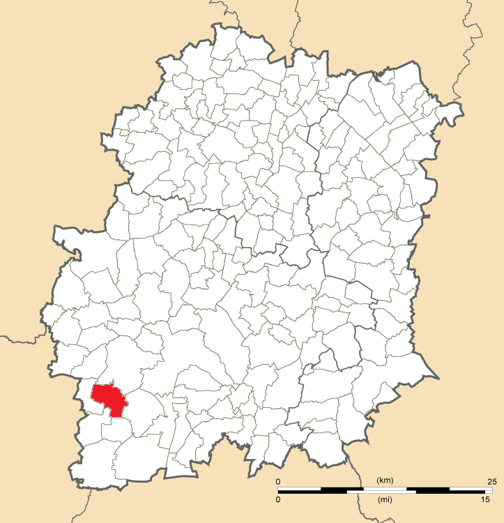 Carte de position de Chalou-Moulineux en Essonne (91)